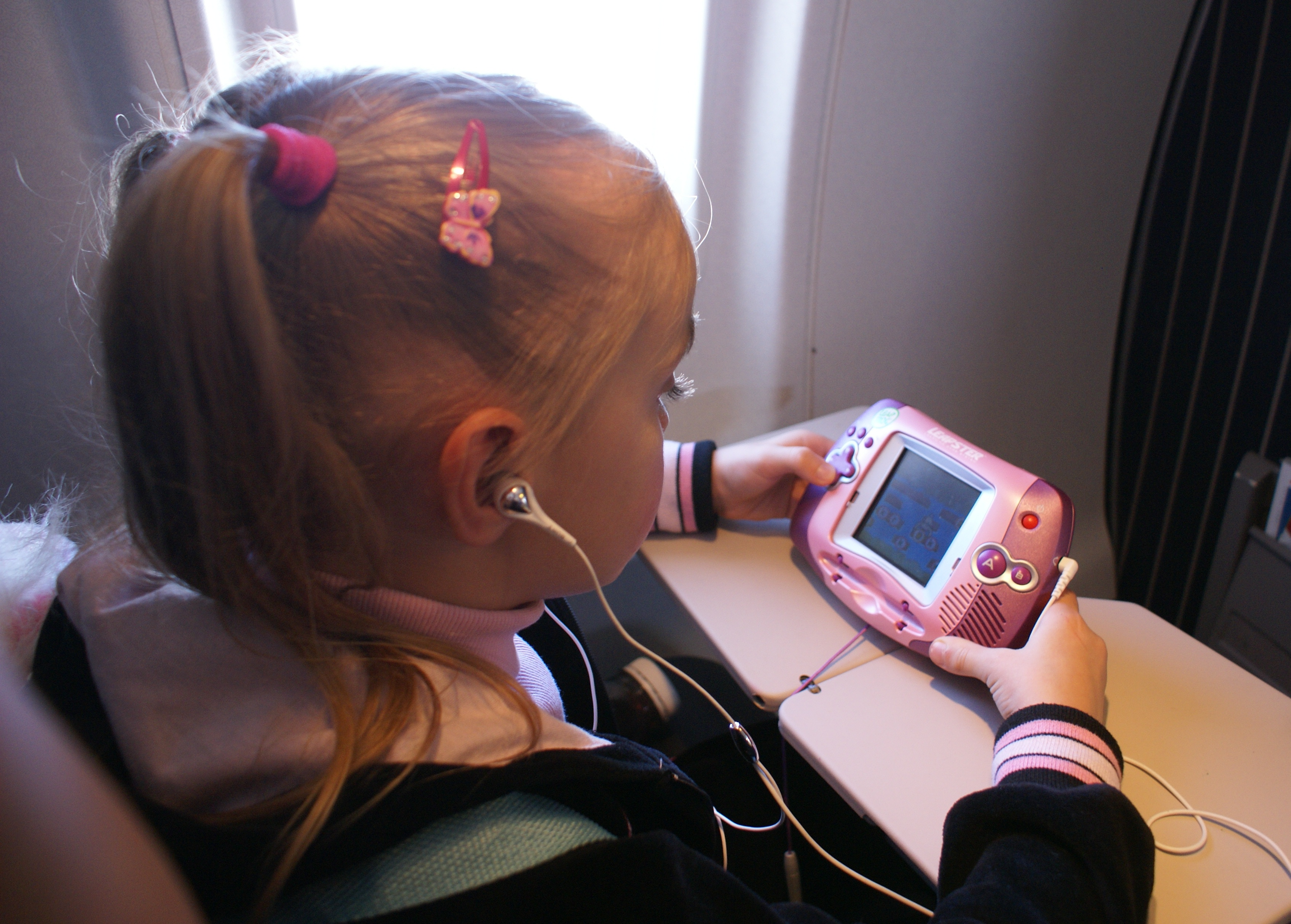 Leapster